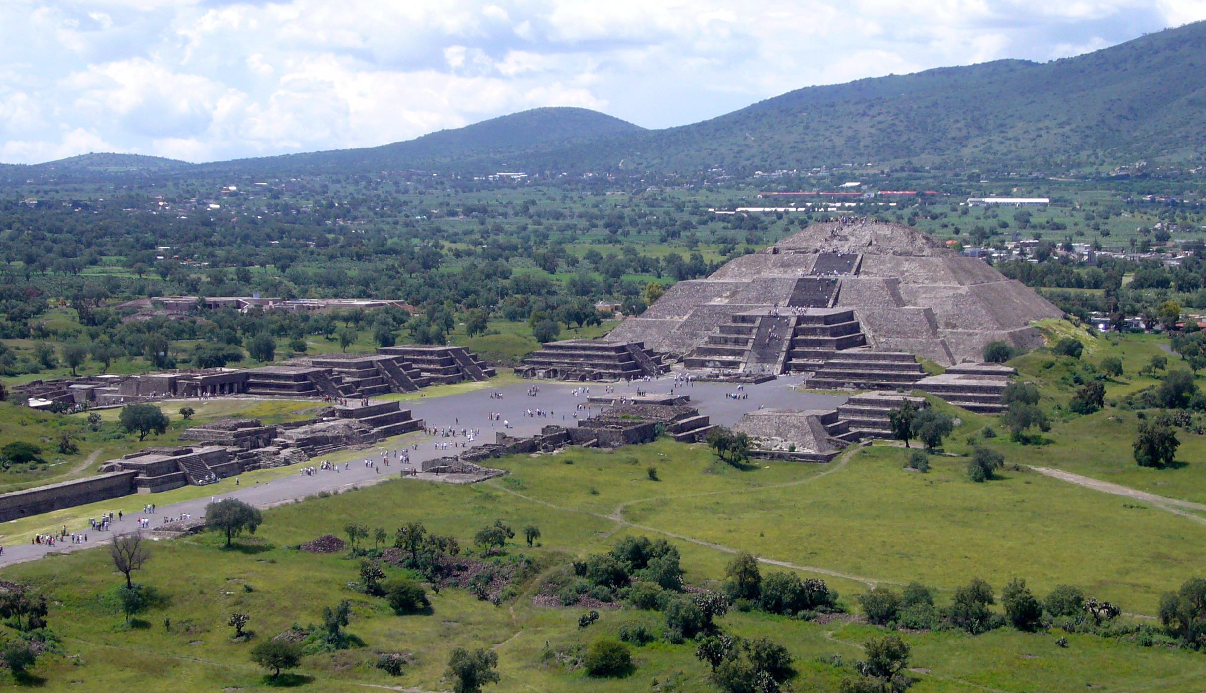 Pirámide de la Luna, Teotihuacán, México